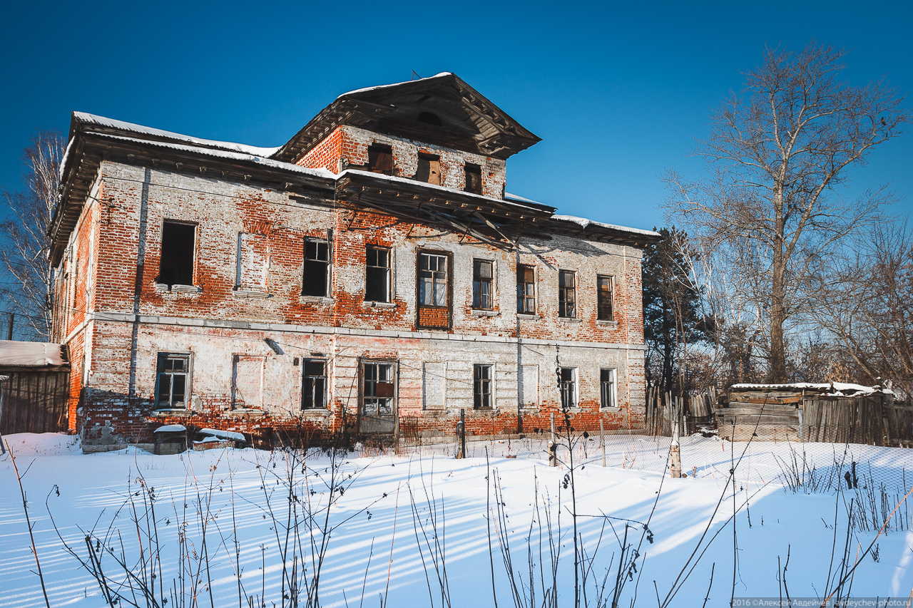 Господский дом (1839 г.) - центральная постройка Рождественского усадебного комплекса. Рождествено, Самарская область